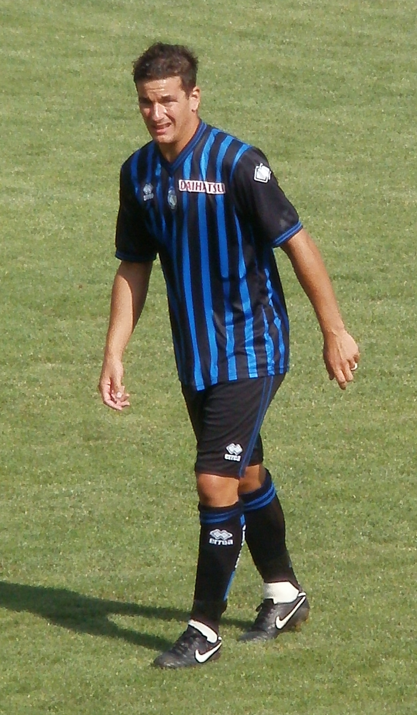 opera propria. Simone Padoin durante l'amichevole Atalanta-Tritium disputata a Clusone il 27 luglio 2010.